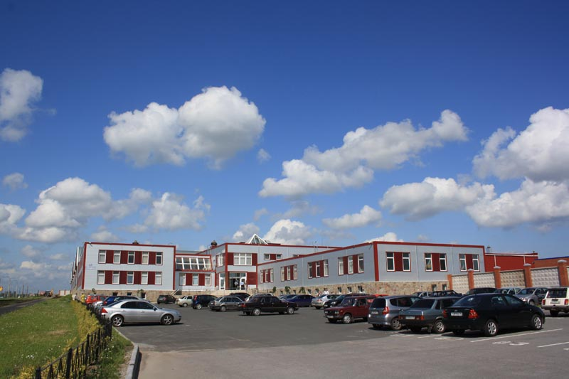 Вентиляционный завод Лиссант, отдел продаж Санкт-Петербург, Индустриальньй проспект, дом 63 (производственная площадка №2)